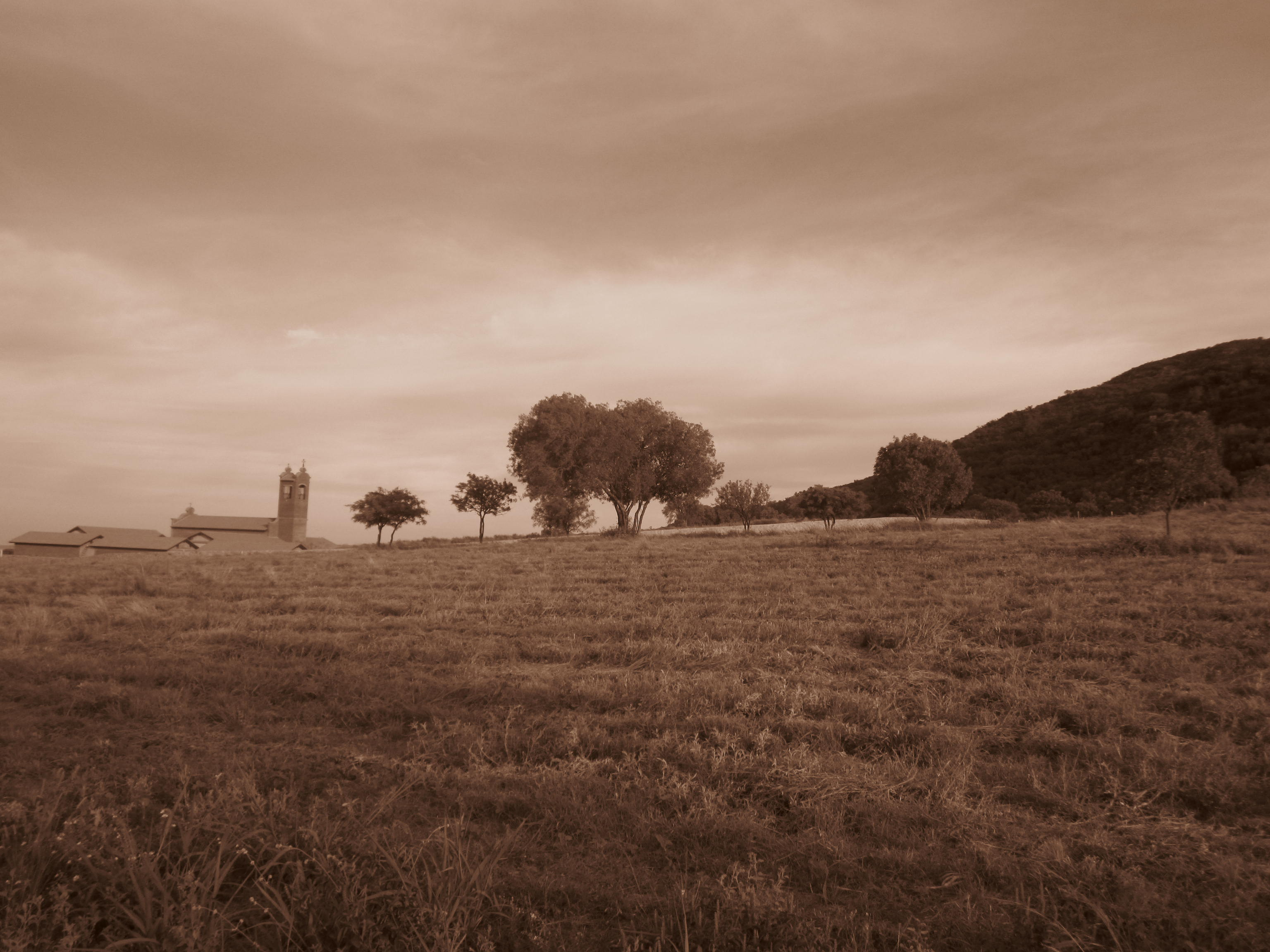 foto sepia